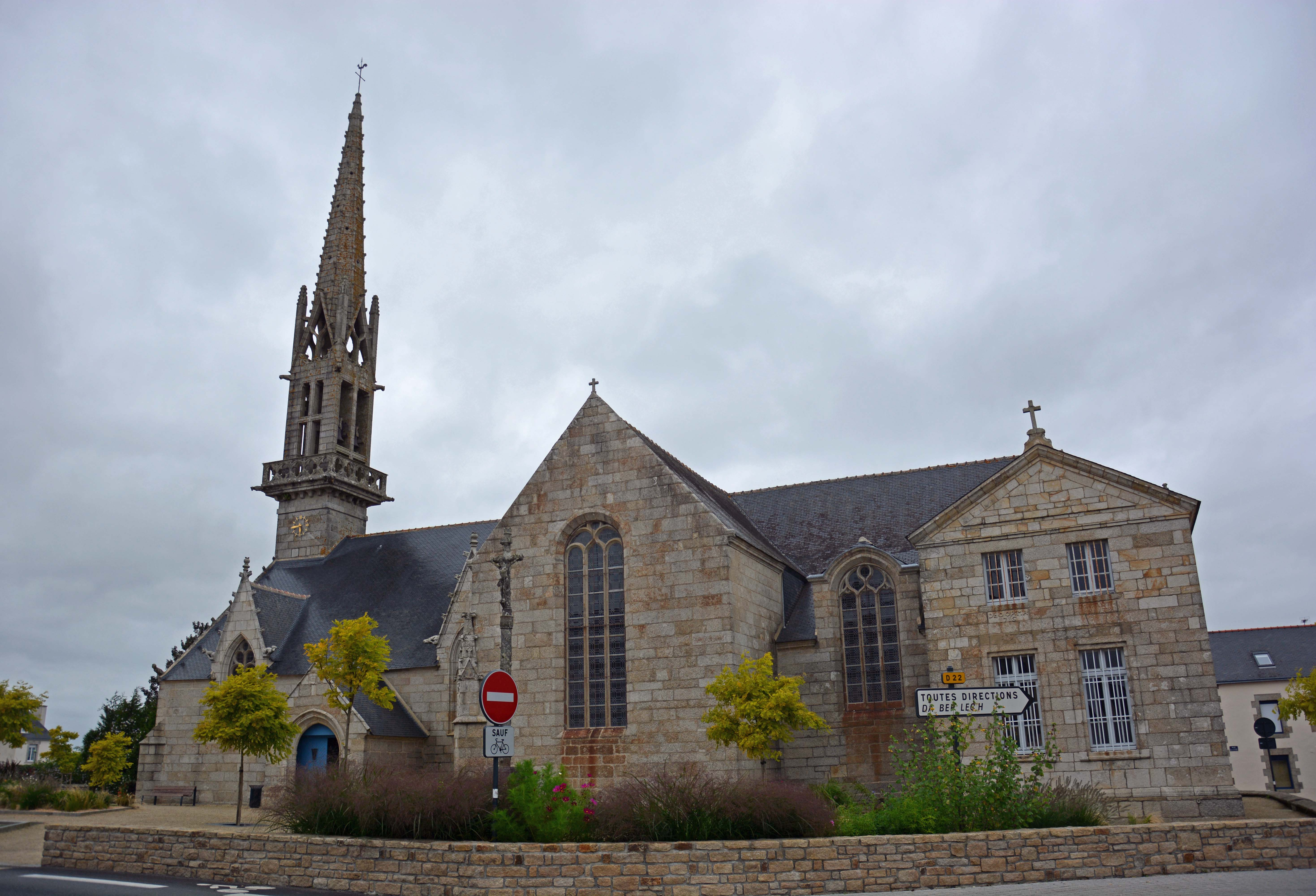 Église Saint-Pierre-et-Saint-Paul à Melgven - Façade sud.